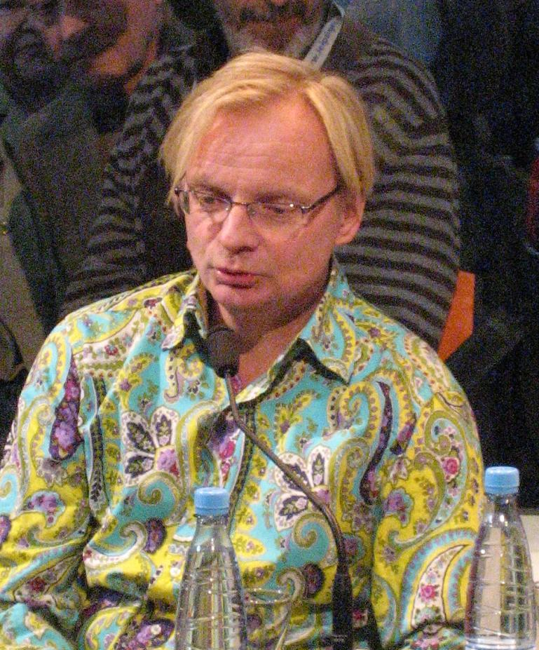 Uwe Steimle (deutscher Kabarettist und Schauspieler) auf der Leipziger Buchmesse 2008